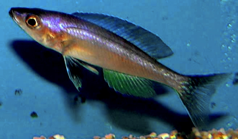 Adult female Cyprichromis leptosoma in an aquarium